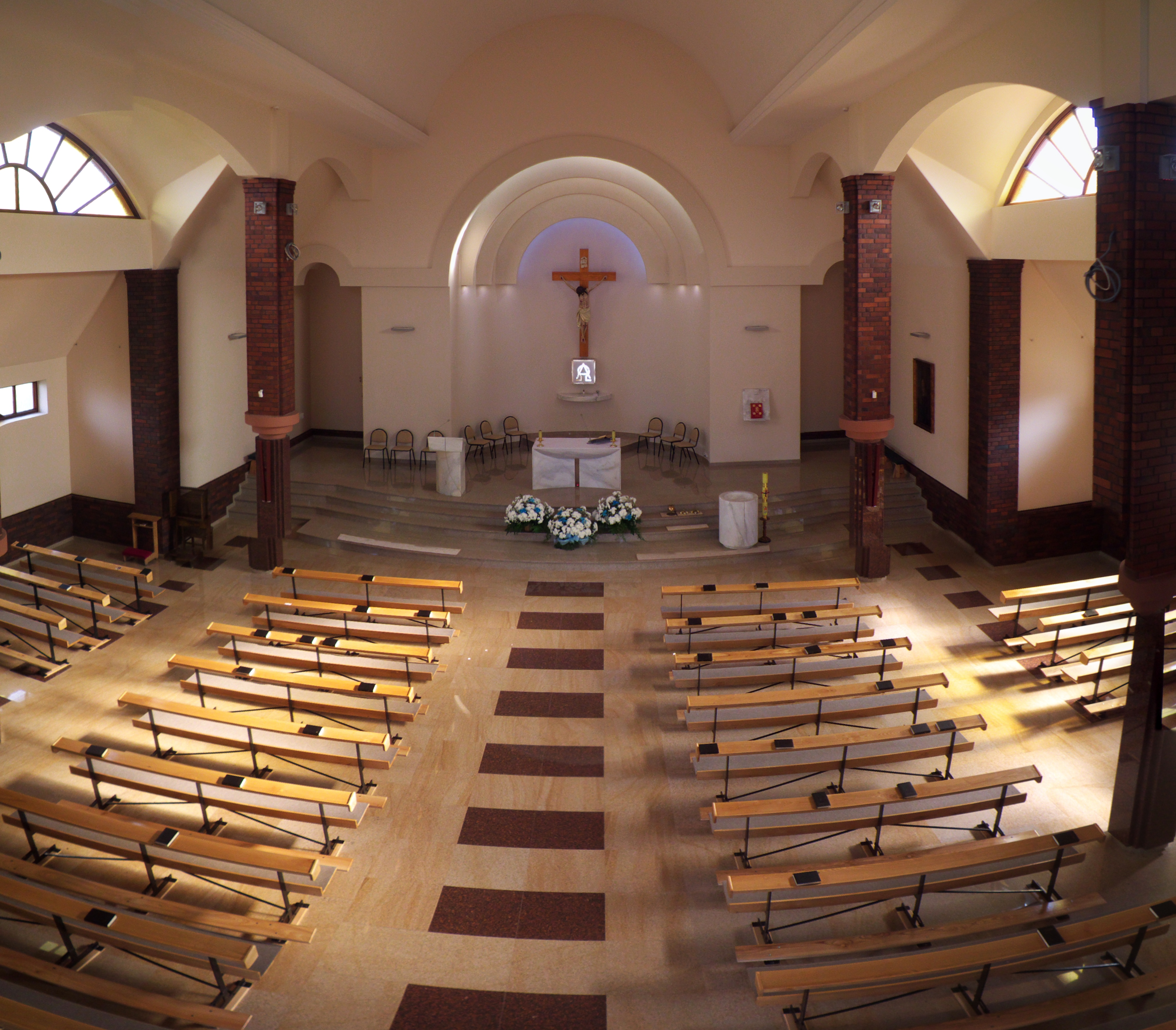 Wnętrze nowego kościoła Matki Bożej Bolesnej w Boruszowicach po sumie odpustowej 18 września 2011 roku.